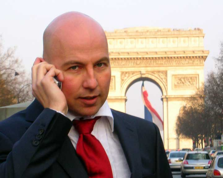 Stefan de Vries telefonerend voor de